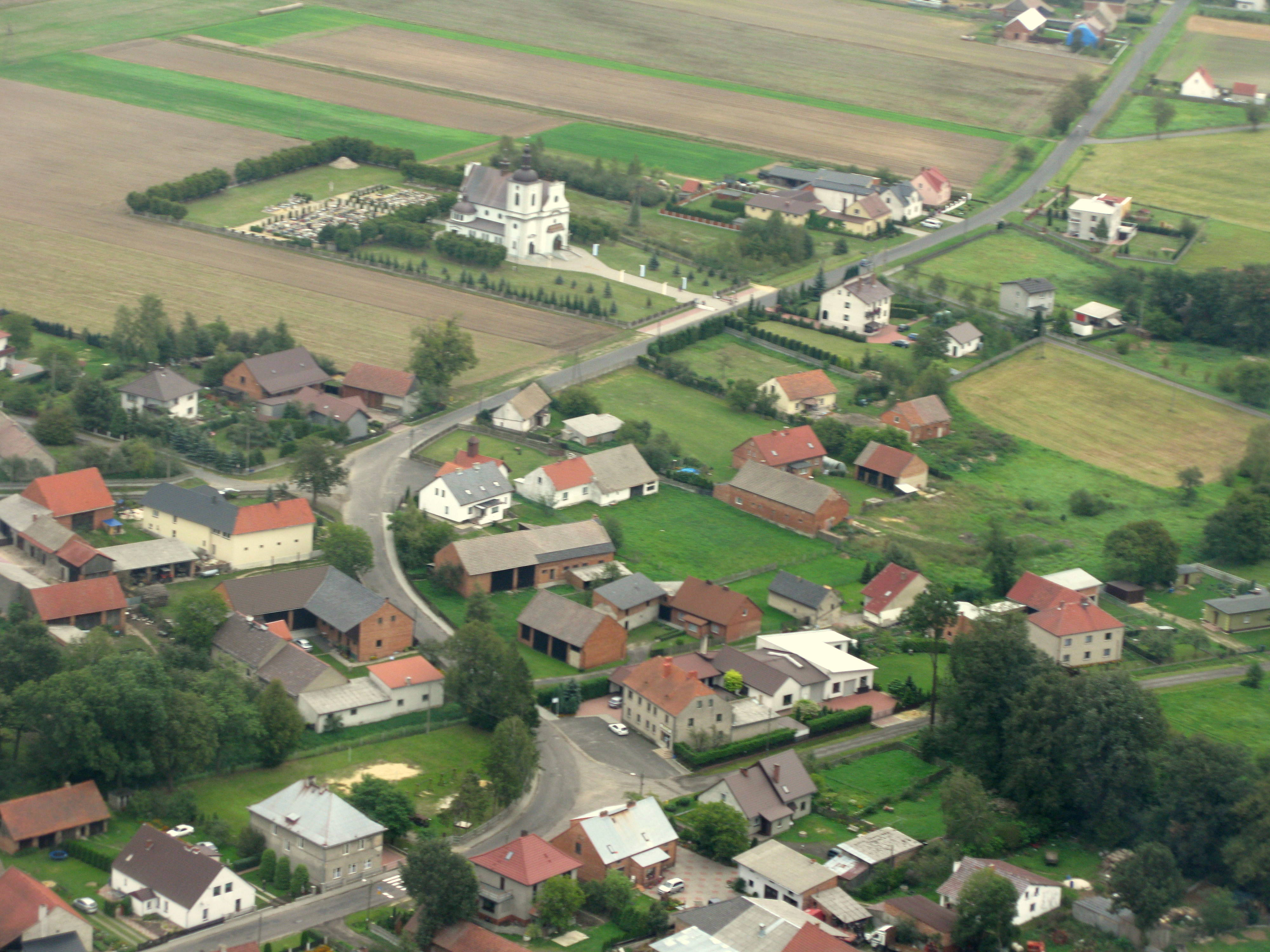 Jezowa z lotu ptaka